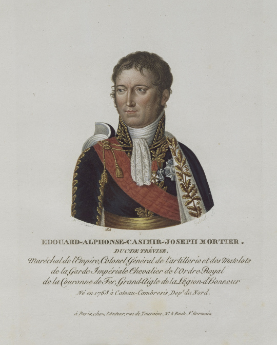 Adolphe Édouard Casimir Joseph Mortier (1768-1835), duc de Trévise, maréchal de France